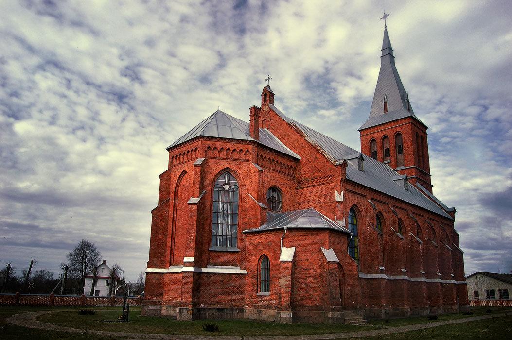 Беларуская (тарашкевіца): Касьцёл Наведзінаў Найсьвяцейшай Дзевы Марыі. в. Альковічы This is a photo of Belarusian heritage monument. Reference number: 612Г000109 ( WLM)